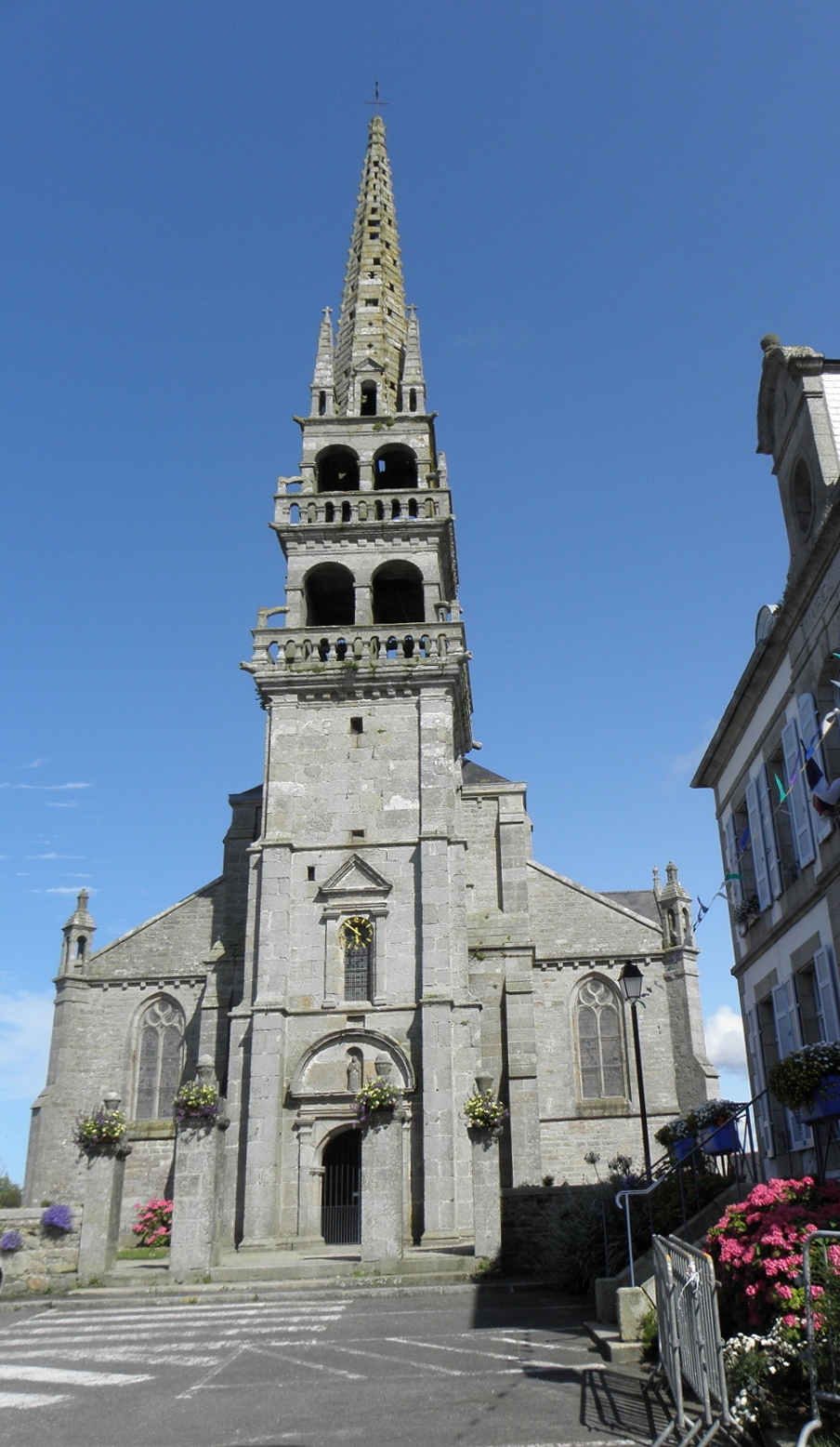 Façade occidentale de l'église Saint-Pierre de Plounéour-Trez (29).